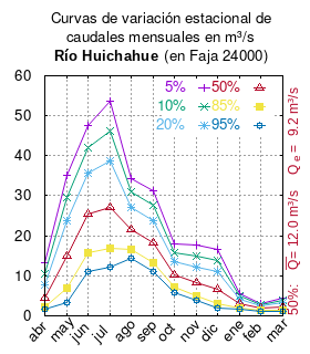 Curvas de variación estacional del río Huichahue en Faja 24000. # Dirección General de Aguas # Diagnóstico y clasificación de los cursos y cuerpos de agua según objetivos de calidad. Cuenca del río Imperial. # Santiago de Chile # Ministerio de Obras Públicas (Chile) # 2004 # url: # urlarchivo: # Tabla 4.13: Río Huichahue en Faja 24000 (m3/s) , pág. 59 mes 5% 10% 20% 50% 85% 95% abr 13.231 10.452 7.856 4.552 2.324 1.566 may 35.174 29.546 23.678 14.817 6.944 3.372 jun 47.631 41.93 35.69 25.534 15.657 10.953 jul 53.626 46.309 38.682 27.162 16.929 12.286 ago 34.408 30.881 27.204 21.651 16.717 14.479 sep 31.164 27.583 23.849 18.211 13.202 10.93 oct 17.878 15.765 13.538 10.116 7.067 5.725 nov 17.747 14.99 12.218 8.262 5.103 3.846 dic 16.541 13.851 10.989 6.646 3.116 1.825 ene 5.565 4.869 4.143 3.046 2.072 1.63 feb 3.06 2.759 2.433 1.914 1.425 1.198 mar 4.522 3.889 3.239 2.284 1.485 1.154 This plot was created with Gnuplot.